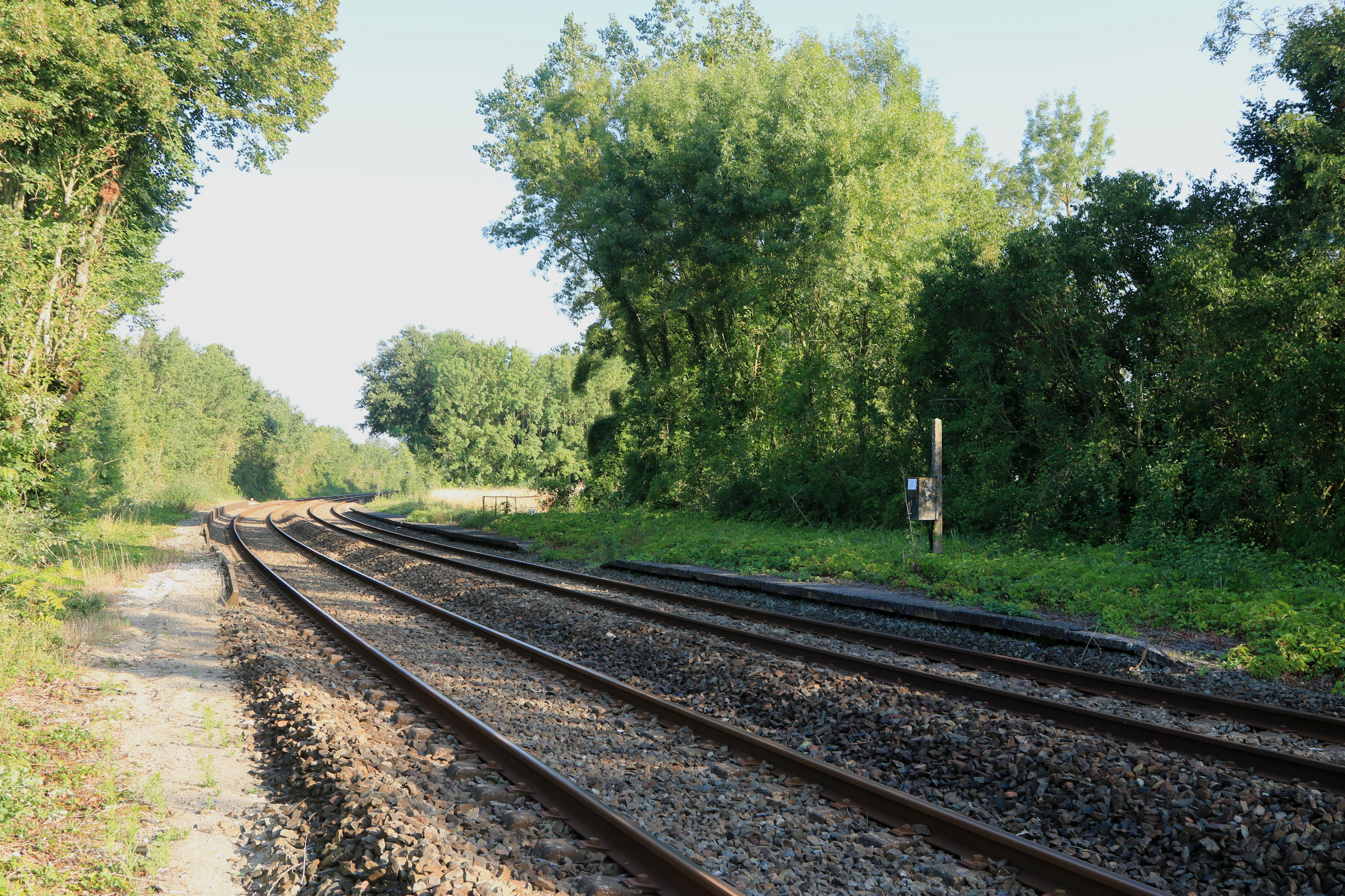 Quais de l'ancienne halte de Cabariot vus en direction de Rochefort.